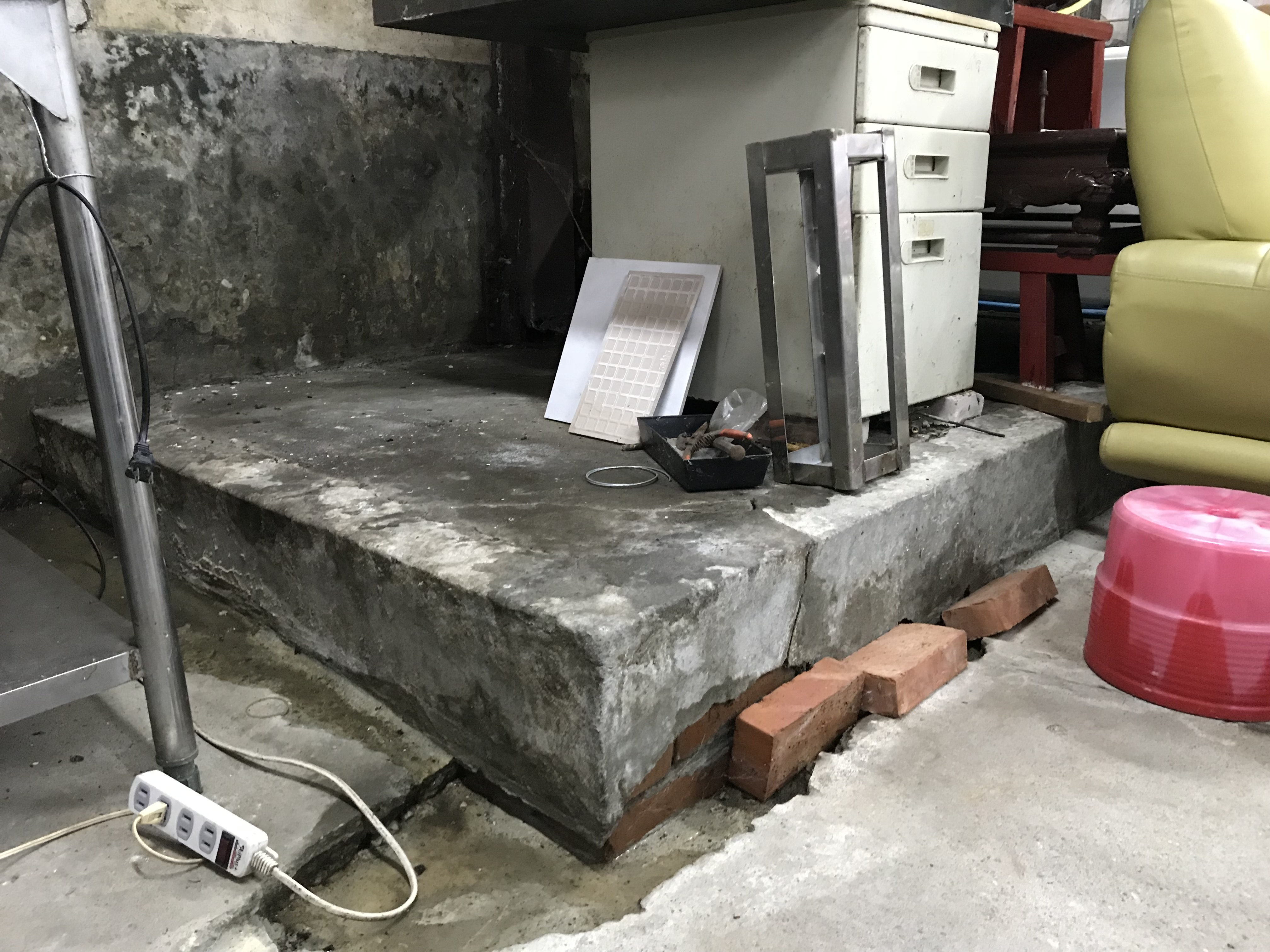 景美福興宮旁屋中的講台。1950年代，此房屋曾為興德國小借用為教室，現為福興宮管理委員會使用，當時講台仍清晰可見。